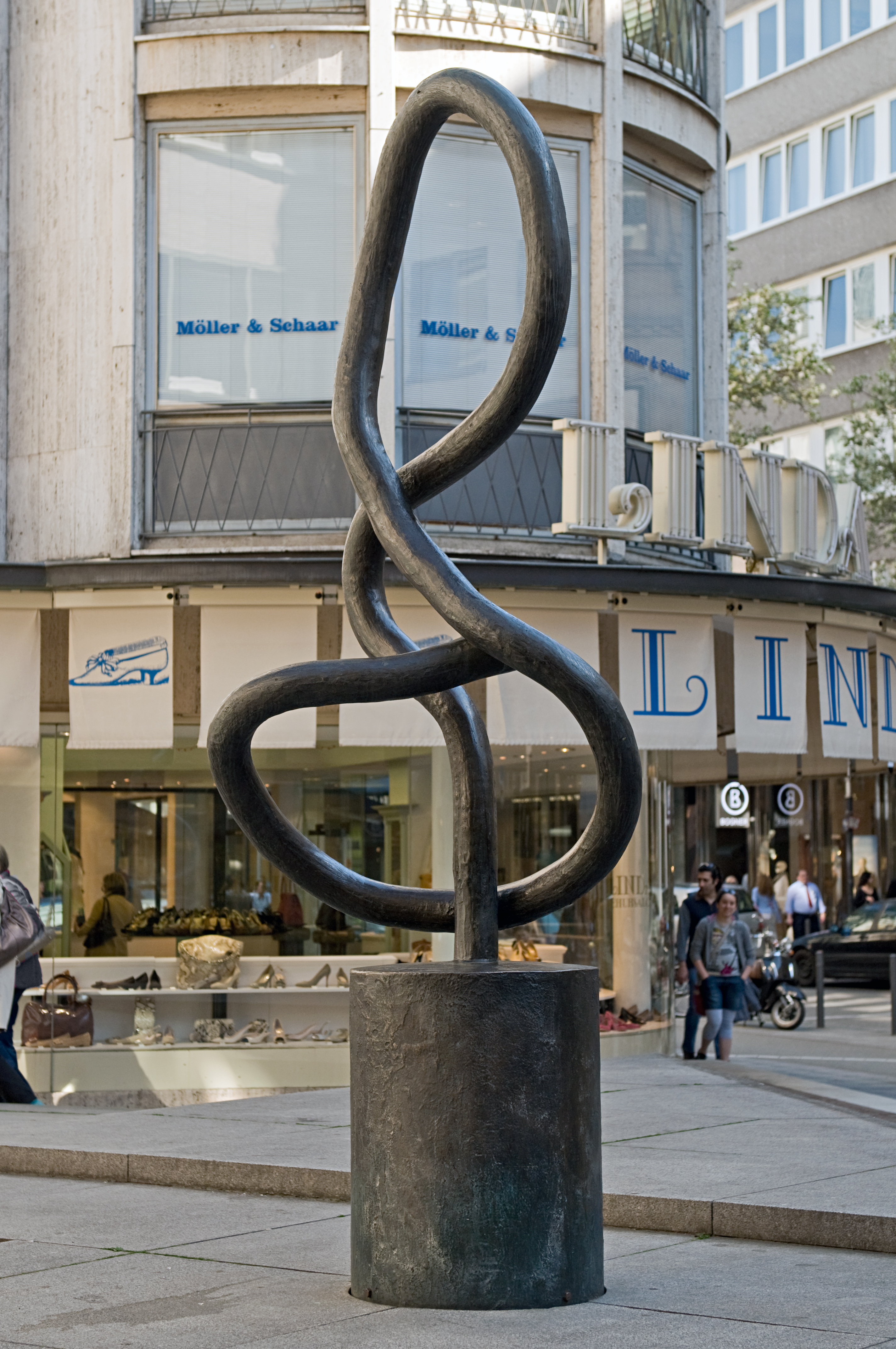 Schwarzer Violinschlüssel Bronzeskulptur von Taro Miyabe aus dem Jahr 1982 am Horst-Lippmann-Platz (Goethestraße/Kleine Bockenheimer Straße) in Frankfurt am Main